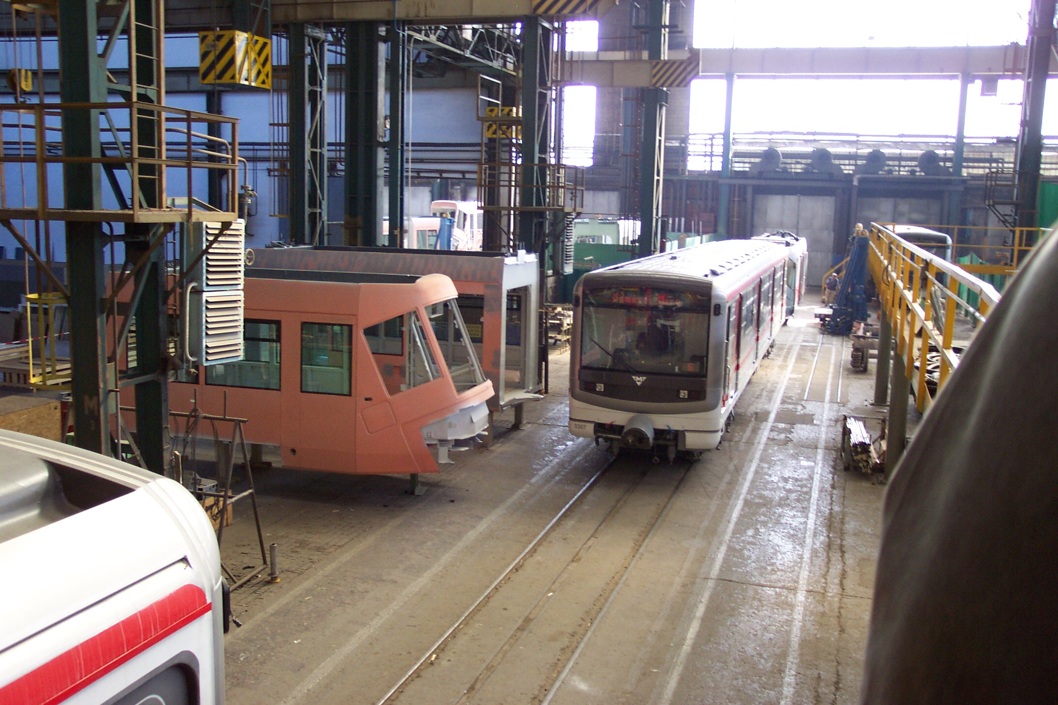 Plzeň, the unfinished metro car type 81-71M in Škoda factory - Plzeň, nedokončený vůz metra typu 81-71M, vyráběný v továrně společnosti Škoda